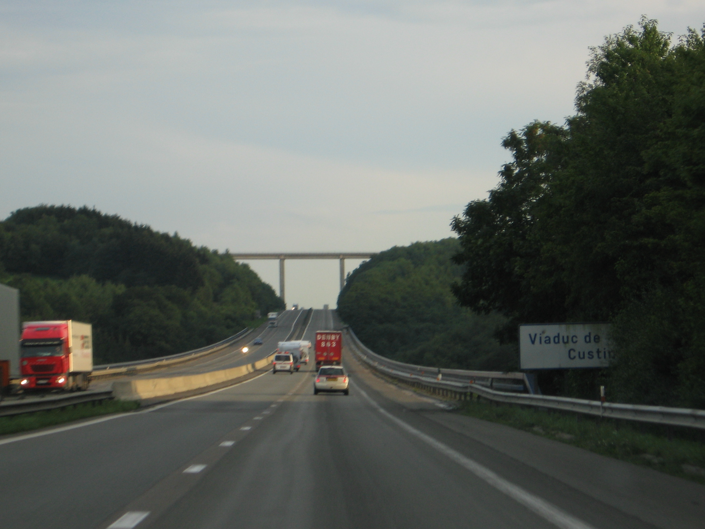 E411 , Viaduc de Custinne